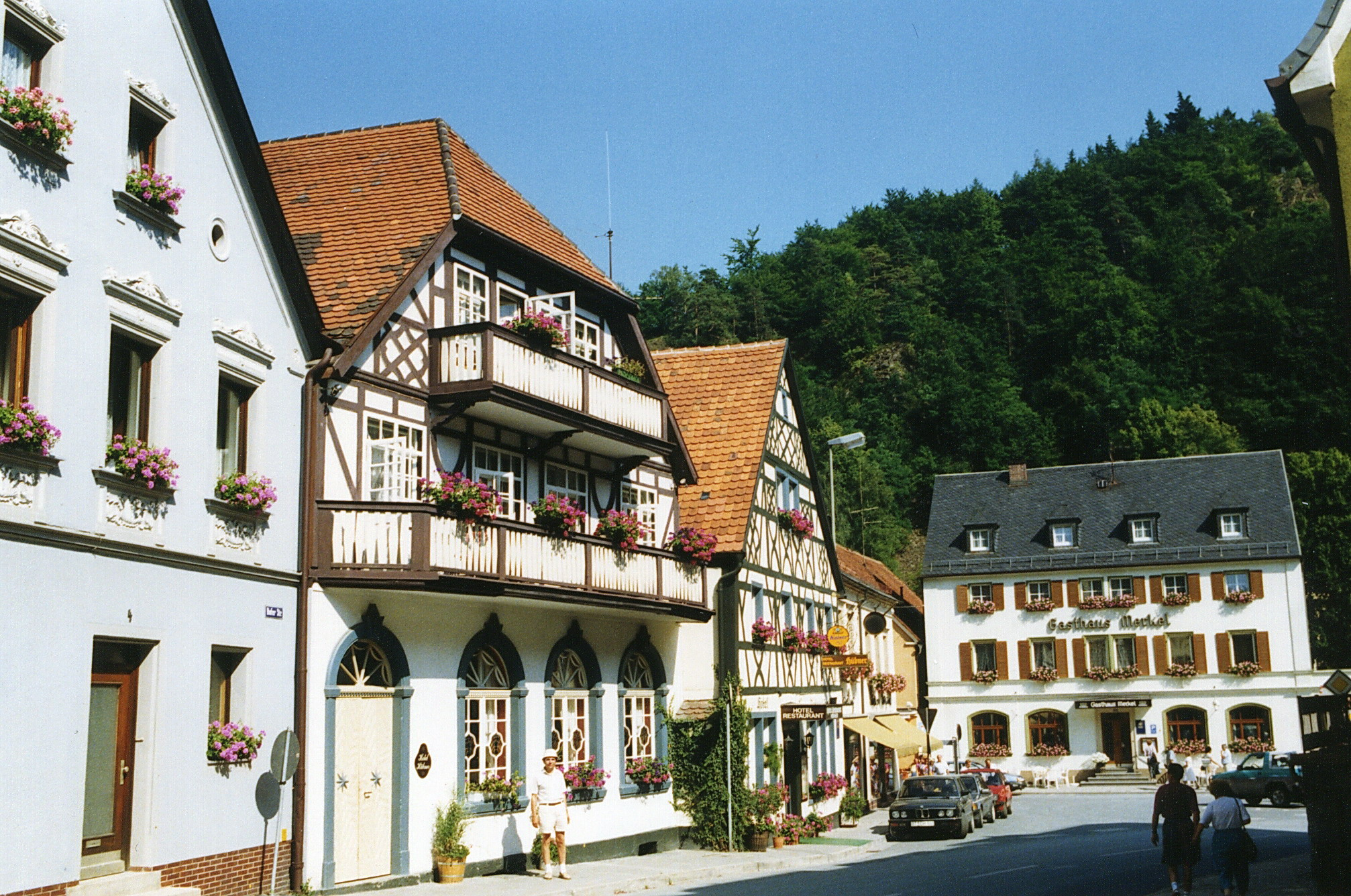 Bad Berneck, Marktplatz